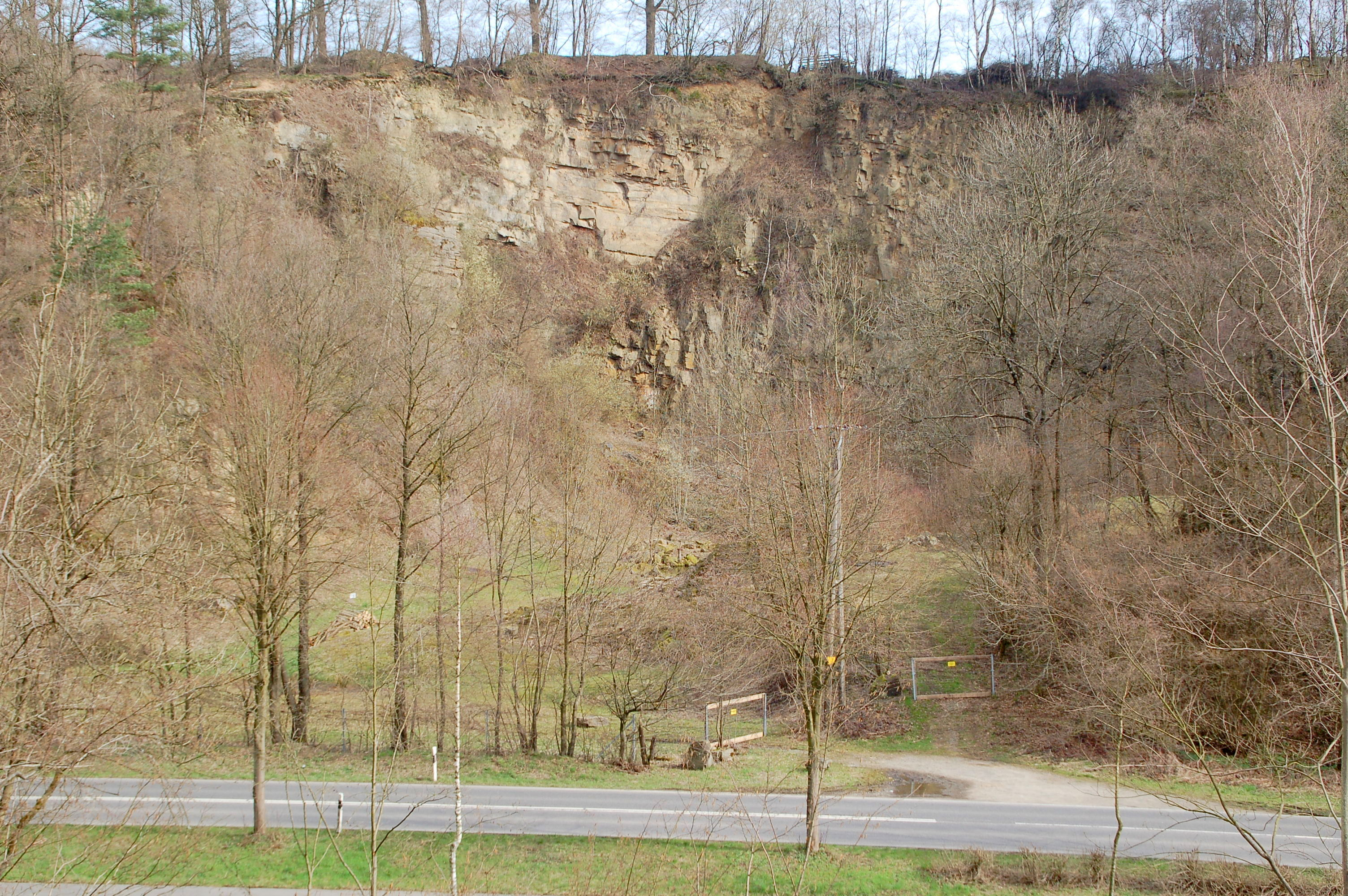 Ehemaliger Steinbruch bei Schönenberg an der B 478, heute Naturschutzgebiet